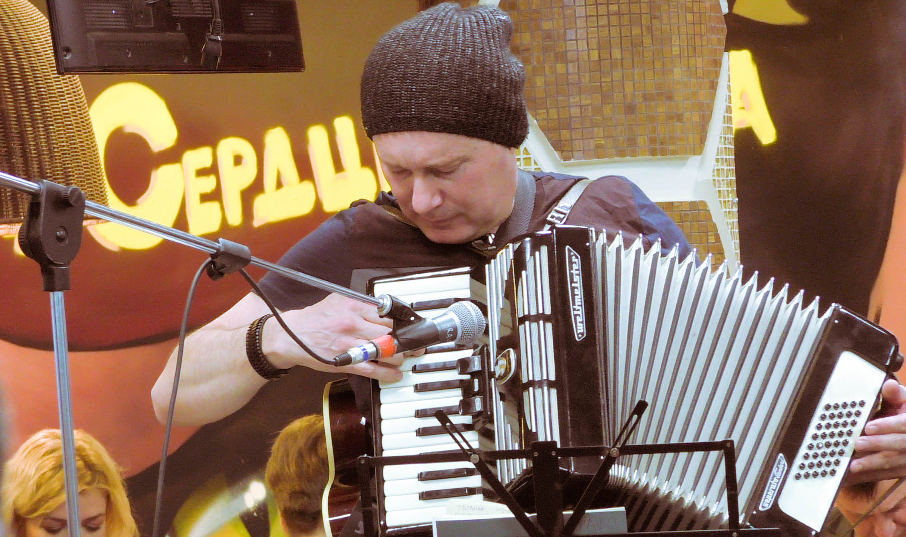 Группа "Браво" в Московском доме книги 20.04.2017.